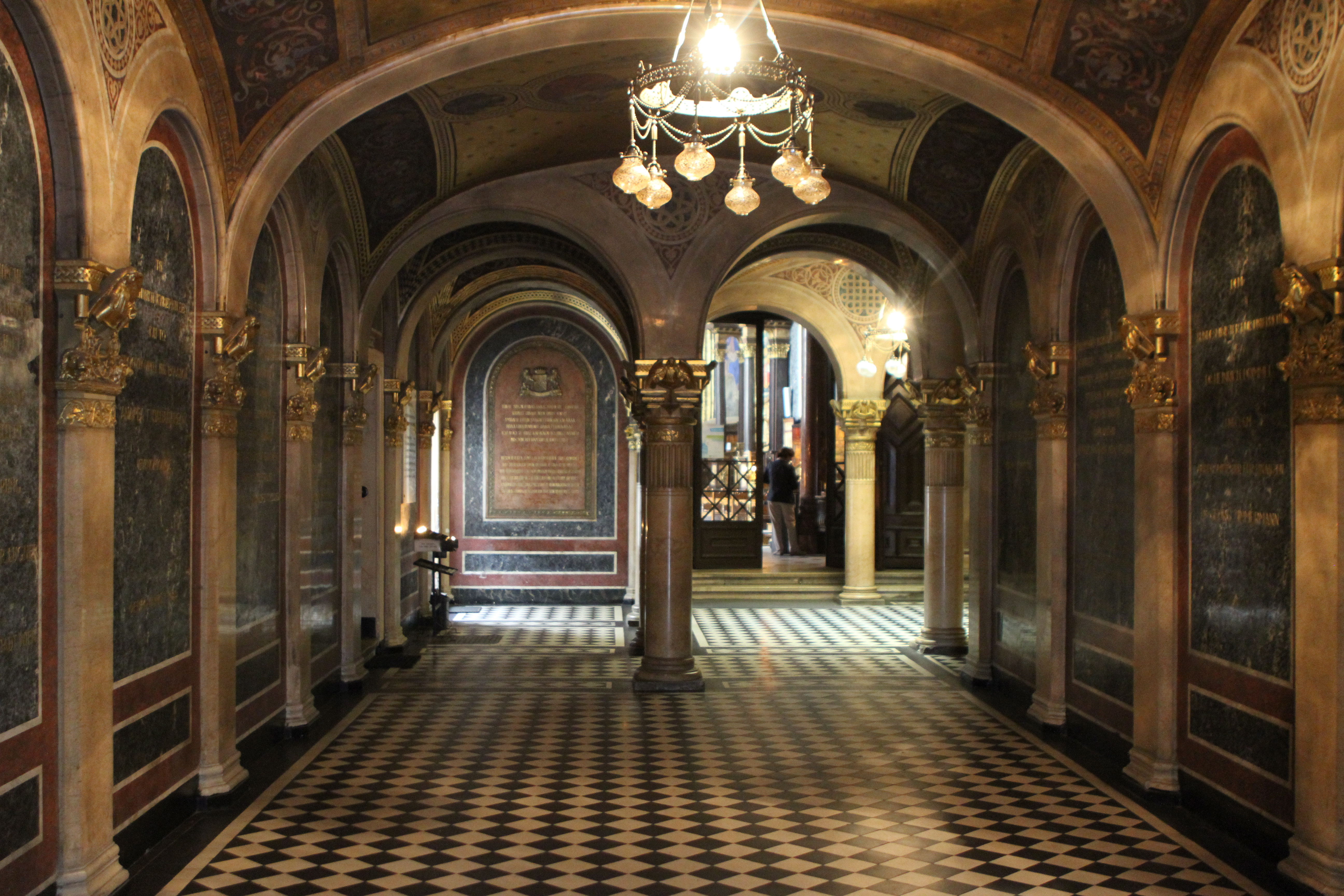 Griech.-orient. (orth.,nichtun.) Kirche Hl. Dreifaltigkeit m.Pfarr- u.Schulhaus